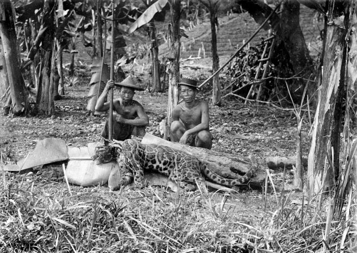 Een geschoten Soenda-nevelpanter, Deli (Sumatra, Indonesia). Repronegatief. Sumatra kende twee 'grote katten', namelijk Sumatraanse tijgers (Panthera tigris sumatrae) en Soenda-nevelpanters (Neofelis diardi). Gedurende de hele 19e eeuw had men aangenomen dat er ook luipaarden (die men ook wel panters noemde) voorkwamen, een mening die nu verlaten is. De vergissing is begrijpelijk, want zowel luipaard als Soenda-nevelpanter kennen een 'melanische' (dat is zwarte) variëteit. Weliswaar is het luipaard wat groter dan de Soenda-nevelpanter, maar wie zo'n beest voorbij ziet flitsen zal aan die wetenschap niet veel hebben. De Soenda-nevelpanter was niet alleen (net als het luipaard, maar in tegenstelling tot de tijger) een goede beklimmer van bomen, de boom was zelfs zijn meest geliefkoosde verblijfplaats. Het zjjn dieren die men zelden te zien krijgt. Tot op de dag van vandaag zijn ze nauwelijks bestudeerd. (P. Boomgaard, 2001).